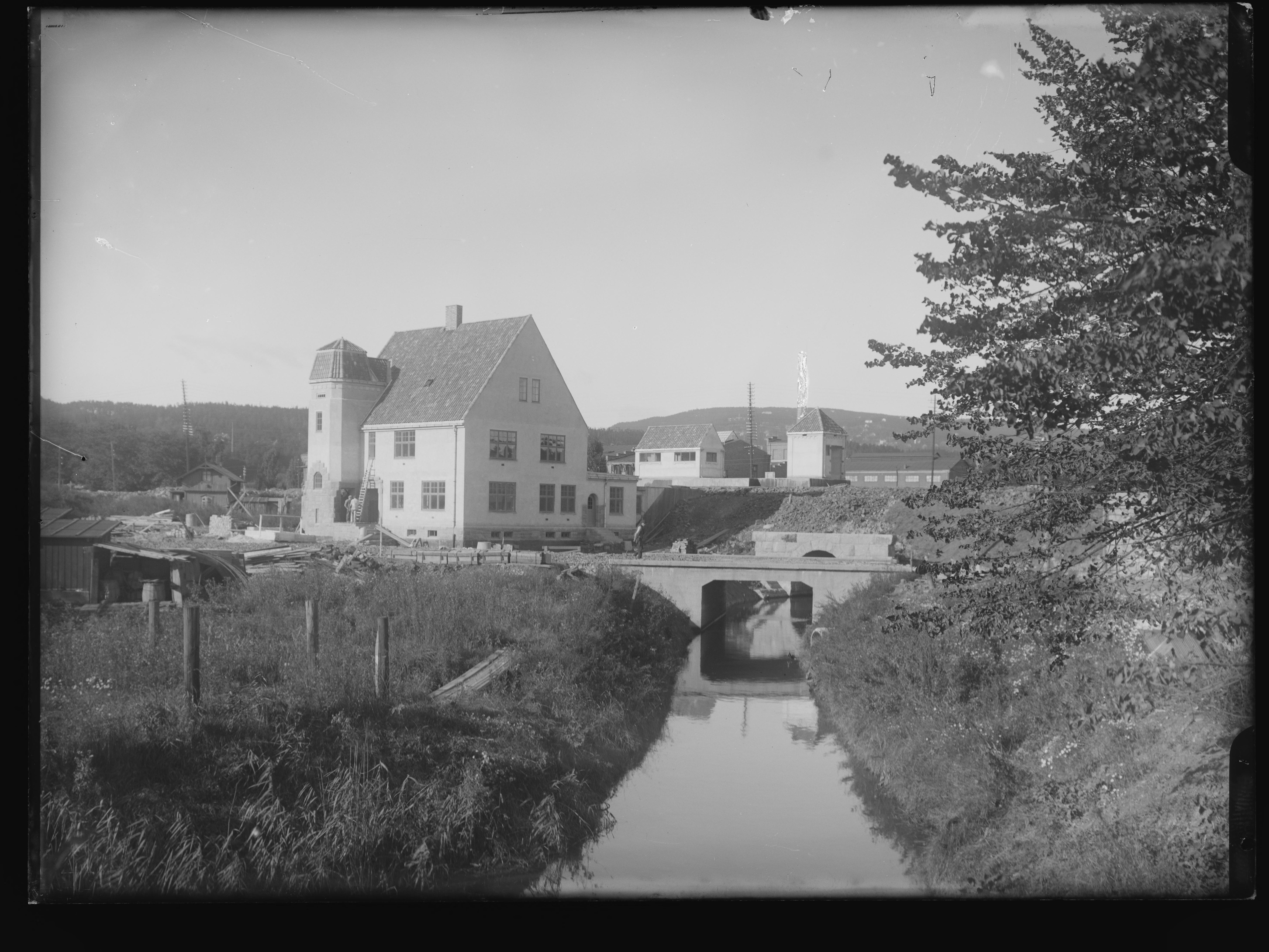 Bildet er hentet fra Nasjonalbibliotekets bildesamling. Anmerkninger til bildet var: Påskrift arkivark: Skøien St. Arkivnummer: 212 Skøyen, Oslo, Oslo